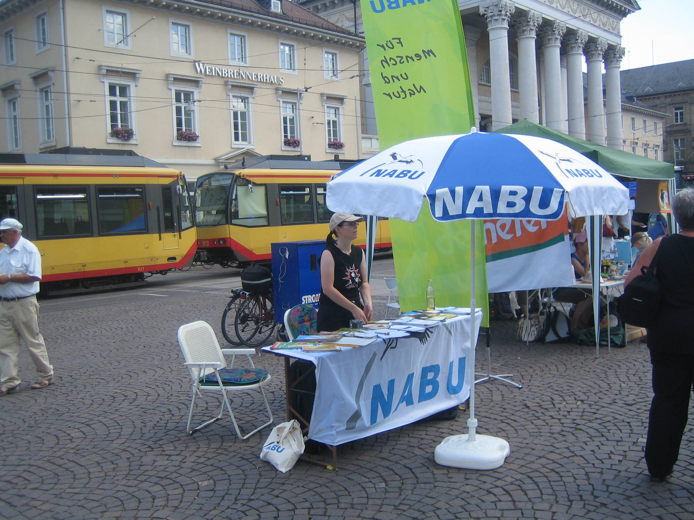 Infostand des NABU auf einer Antigentecknikdemo in Karlsruhe